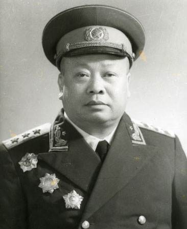 赖传珠上将1955年授勋照